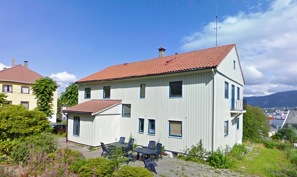 Bergen ungdomshjem, Herman Grans vei 1